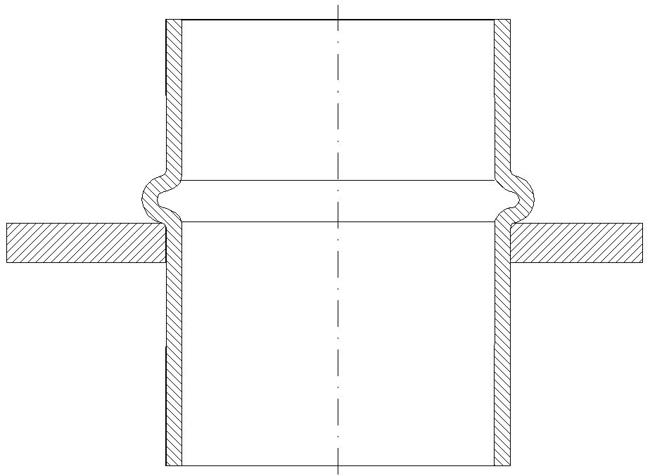 Sposób osadzenia rozpęczanej tulei w otworze Autor: --Pawel S 00:40, 20 kwi 2007 (CEST) Rysunek wykonany w programie OpenOffice Draw